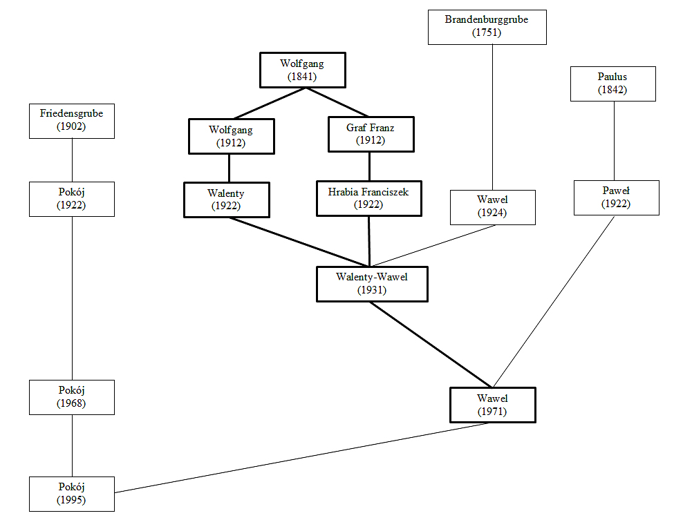 Darstellung der Aufspaltungen und Fusionen des Bergwerks Walenty-Wawel